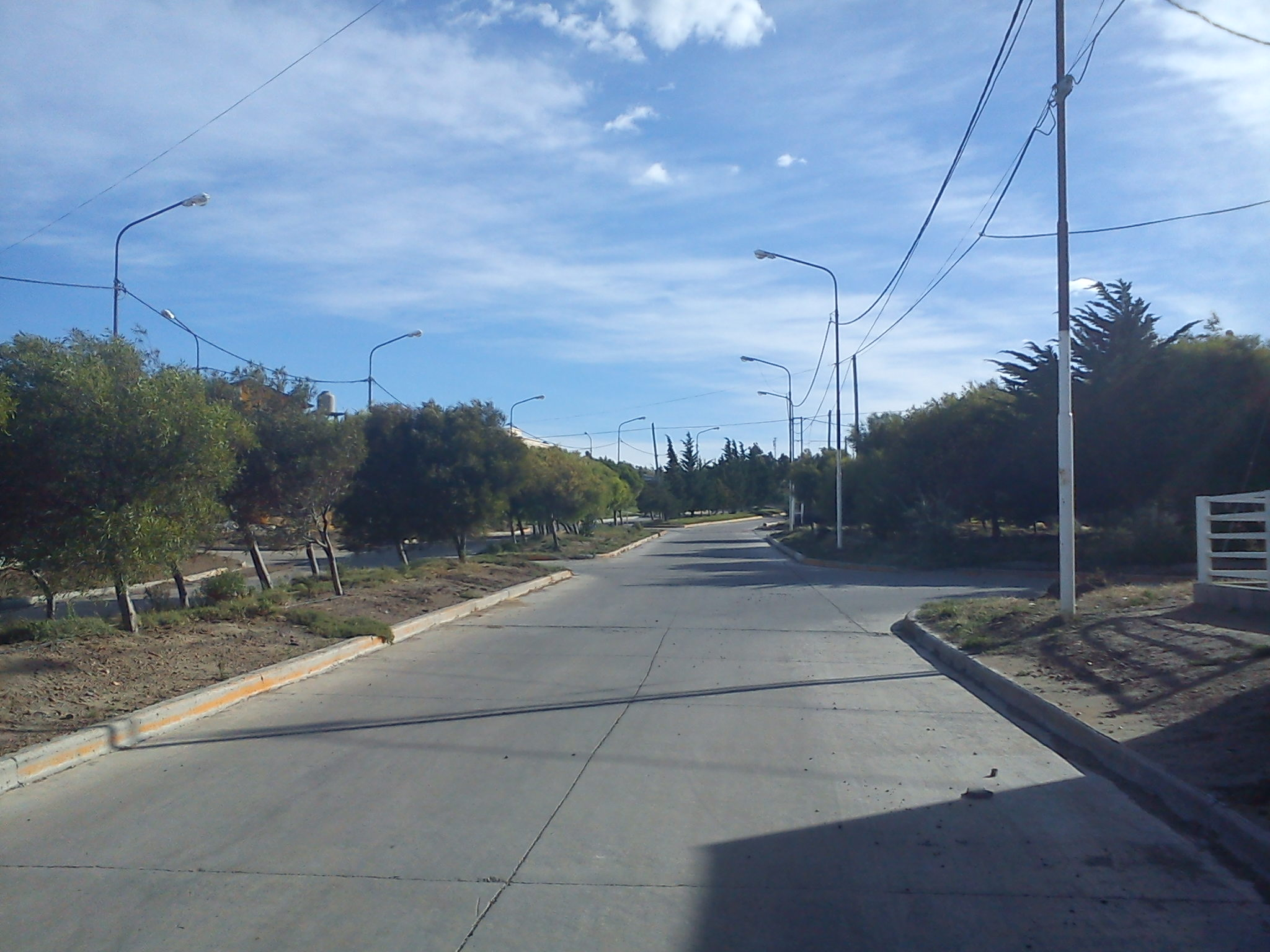 Vista a la avenida